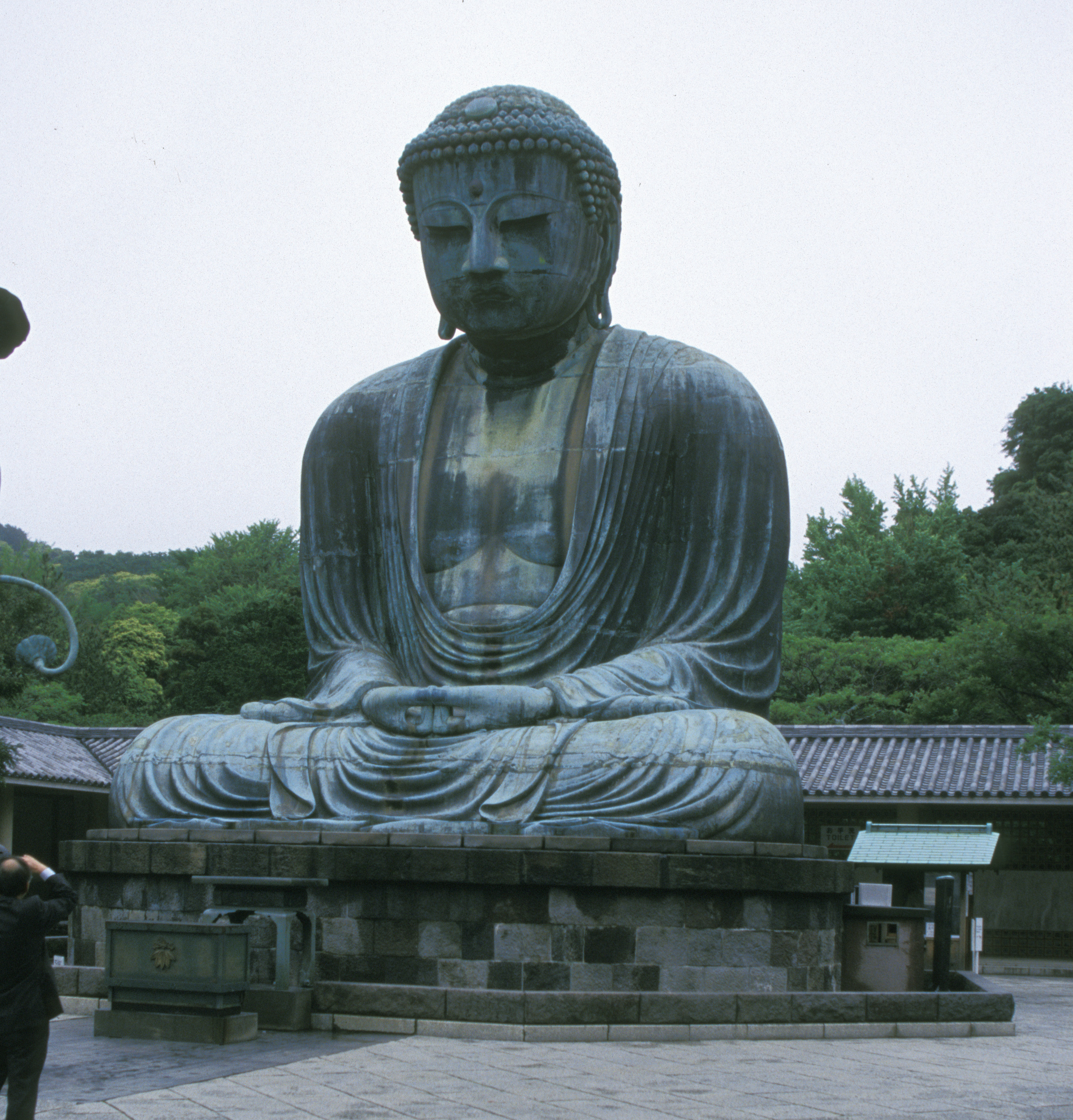 Buddha statue, Kamakura, Japan